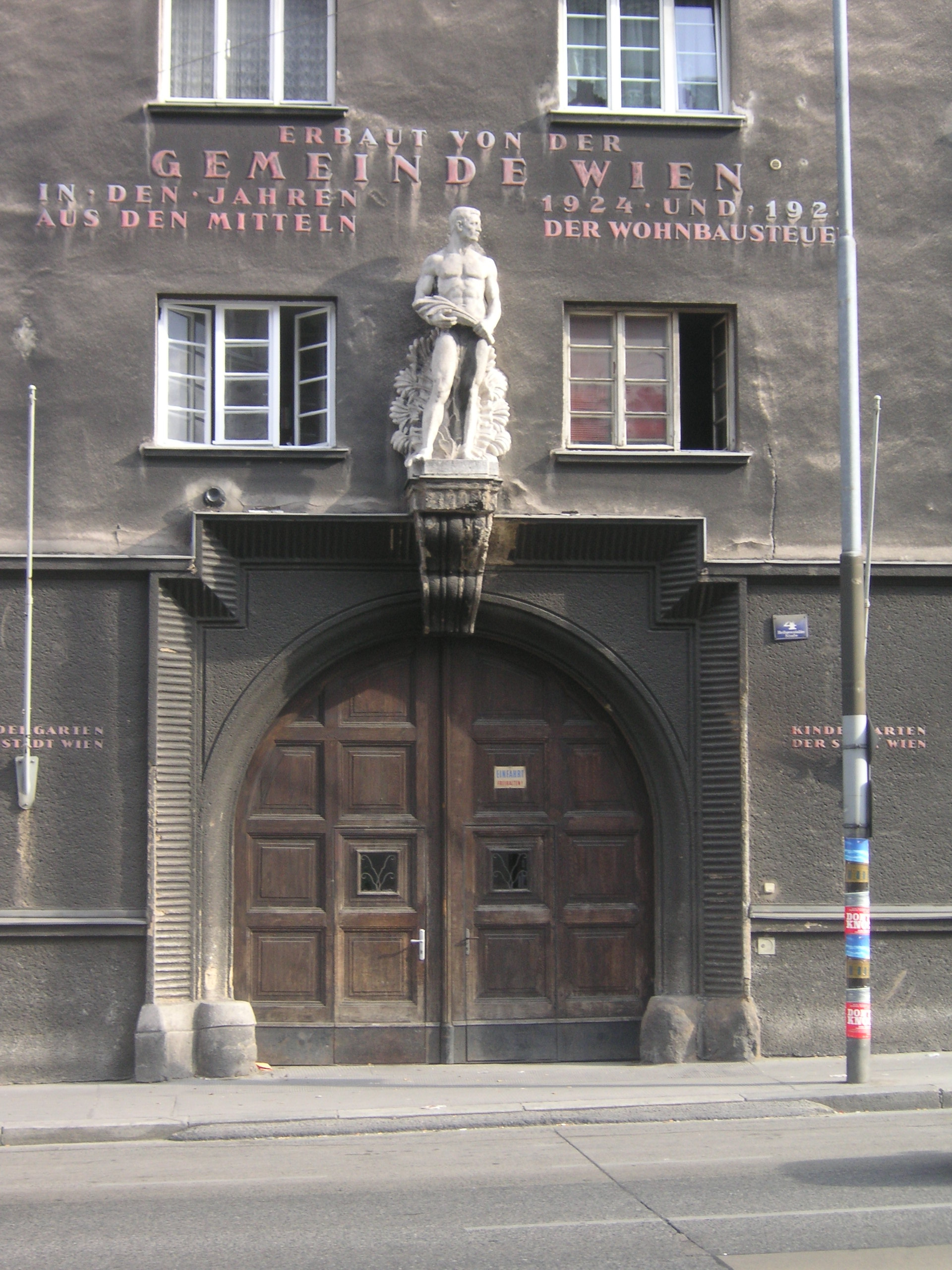 Gall-Hof, Gemeindebau in Alsergrund, Vienna